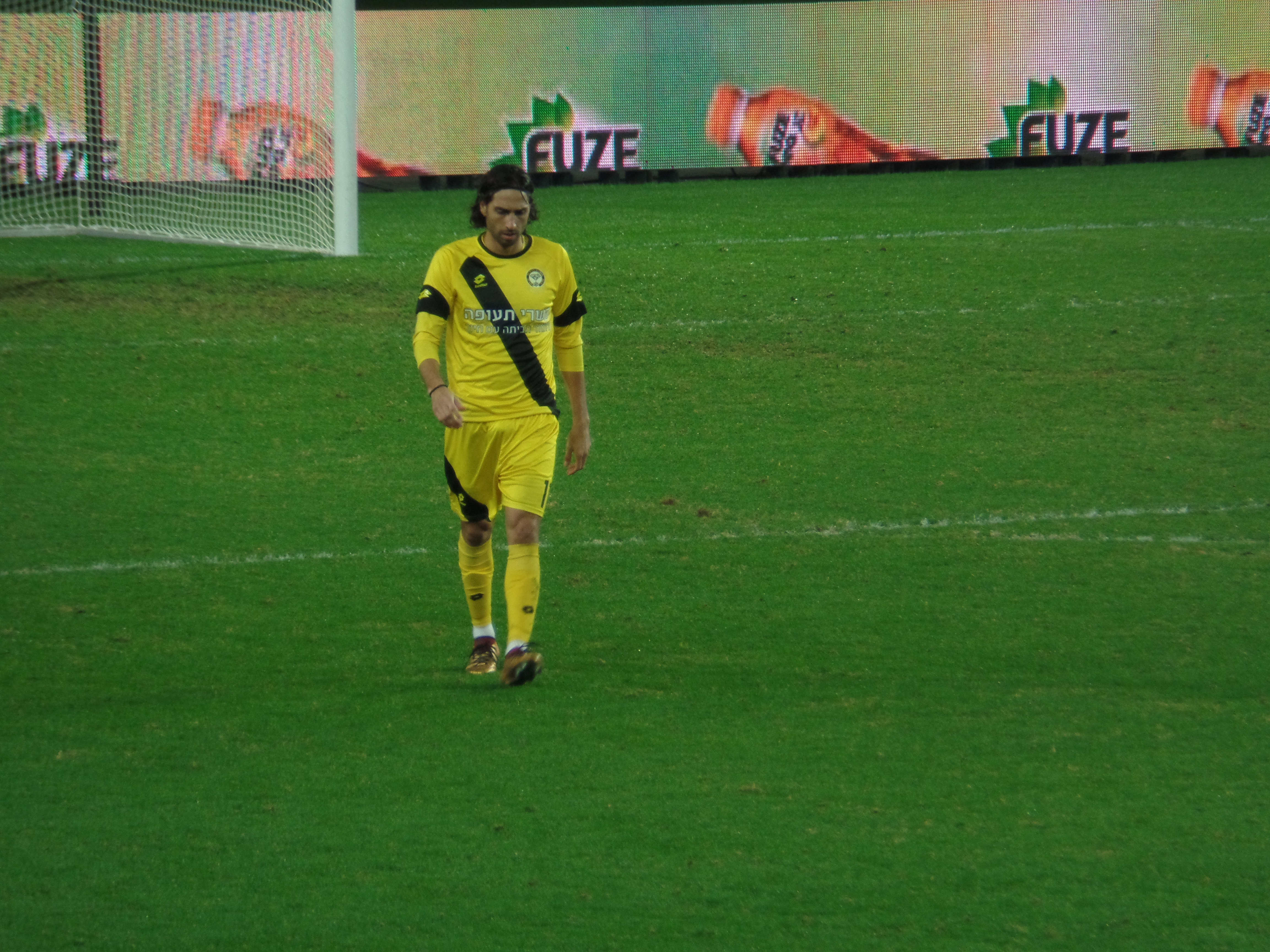 ברק בדש במדי מכבי נתניה